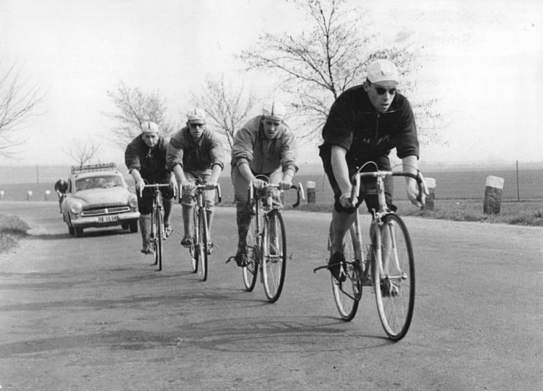 Leipzig, DDR-Radrennfahrer, Training Zentralbild Wendorf-Laske 13.4.61Friedensfahrtkandidaten trainieren. Seit einigen Tagen trainieren die Friedensfahrtkandidaten in Leipzig. UBz: Auf den Straßen bei Leipzig sieht man Ampler, Adler, Schur, Weissleder (v.r.n.l.) eifrig trainieren.